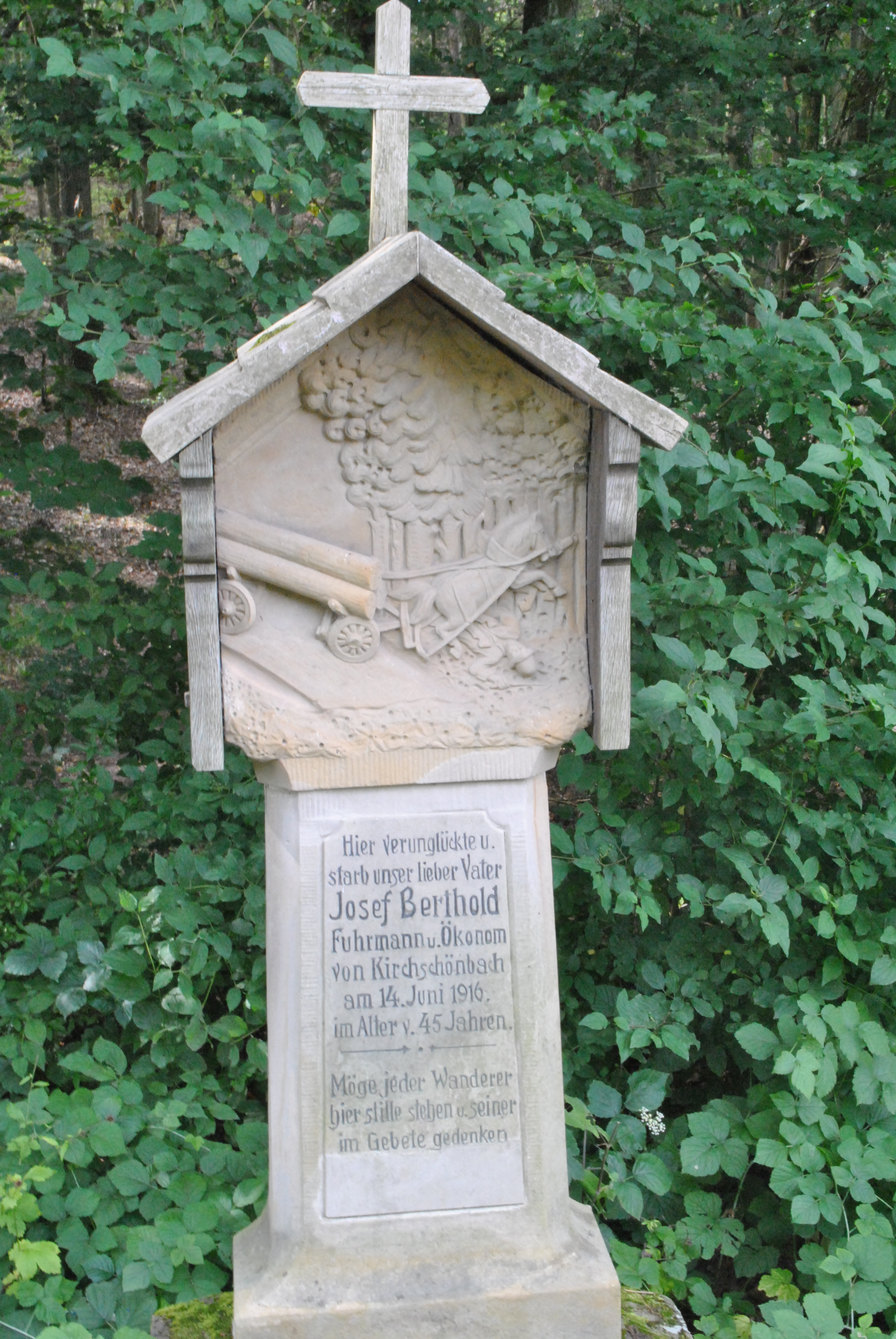 Bildstock, Abtswind-Friedrichsberg "Stickelsberg", Gedenkstein mit Sandsteinrelief Darstellung eines Unglücksfalls, bezeichnet „1916“ D-6-75-111-42